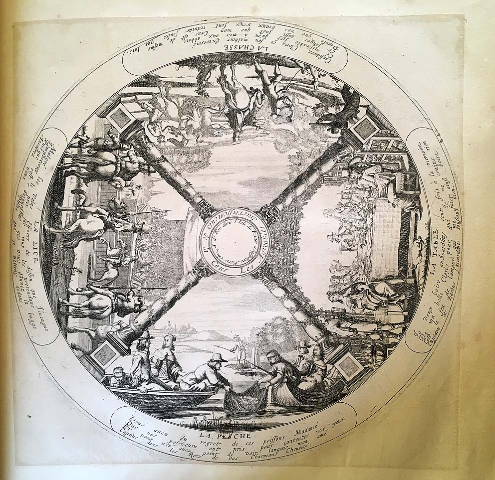 Feuille pour un écran rond à main attribué à François Chauveau, chez Antoine de Fer, c. 1640. BnF, Rés. Ed. 44-3, p.152